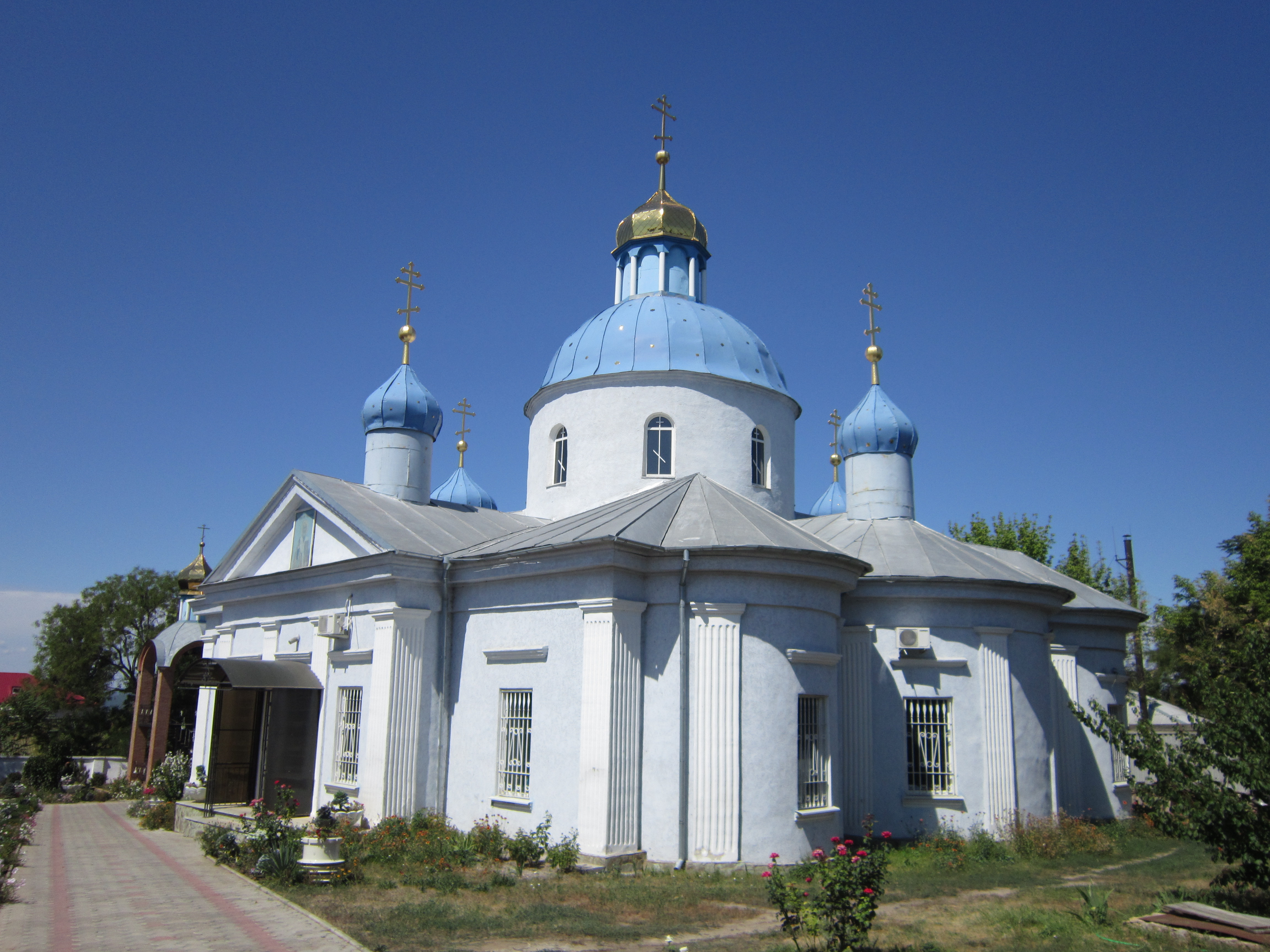 Церква Миколи Угодника, смт Овідіополь, 1830 р.